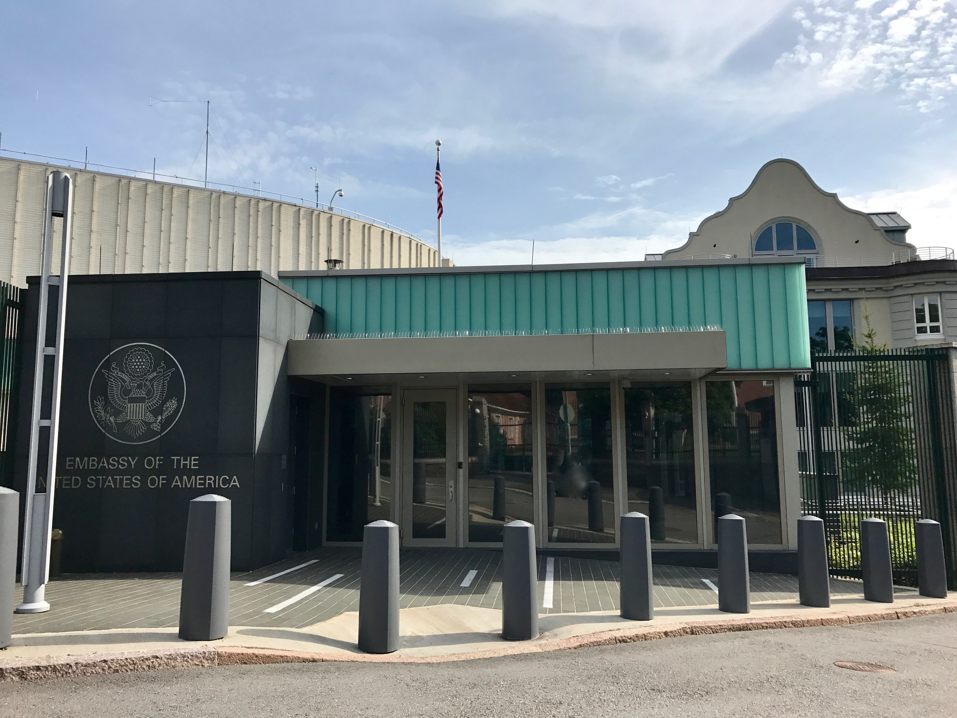 Yhdysvaltain Helsingin-suurlähetystön sisäänkäynti osoitteessa Itäinen Puistotie 14.